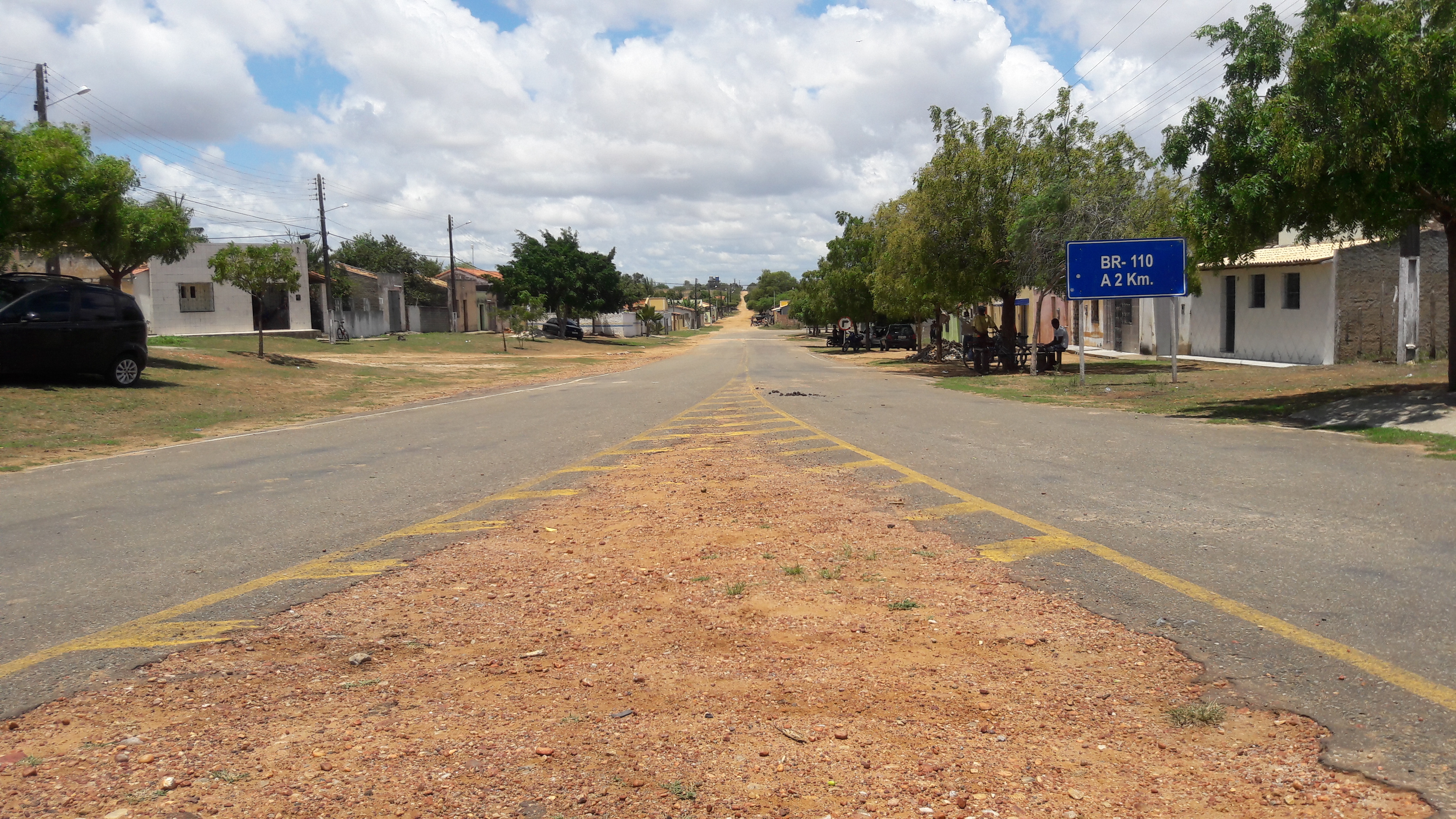 São José do Paiaiá Foto: Carlos Sílvio